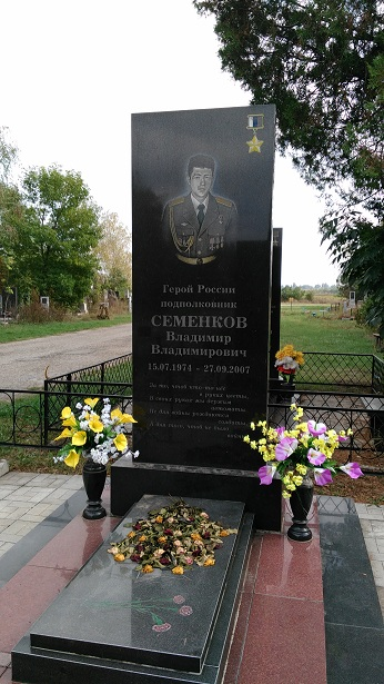 Семенков Владимир Герой России. Надгробный памятник на аллее Славы в Майкопе